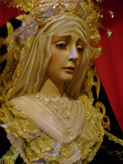 Primer plano de la titular de la hermandad del Santo Entierro de Manzanares